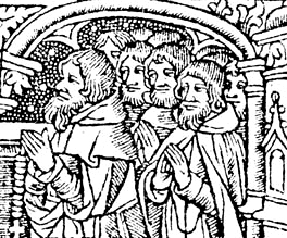 Gravure moyenâgeuse moines en prière